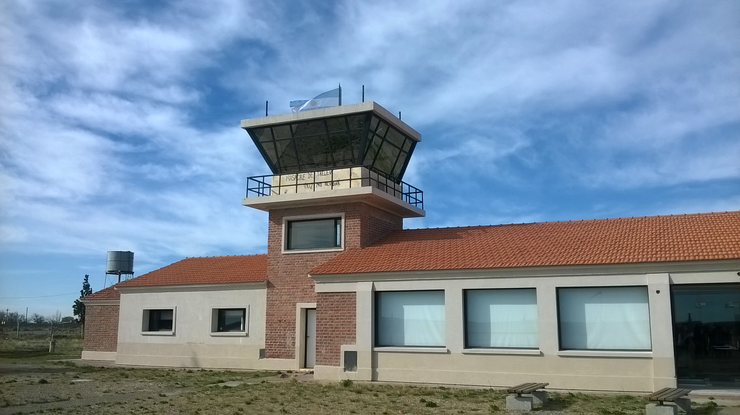 Antiguo Aeropuerto de Trelew, lugar de la Masacre de Trelew